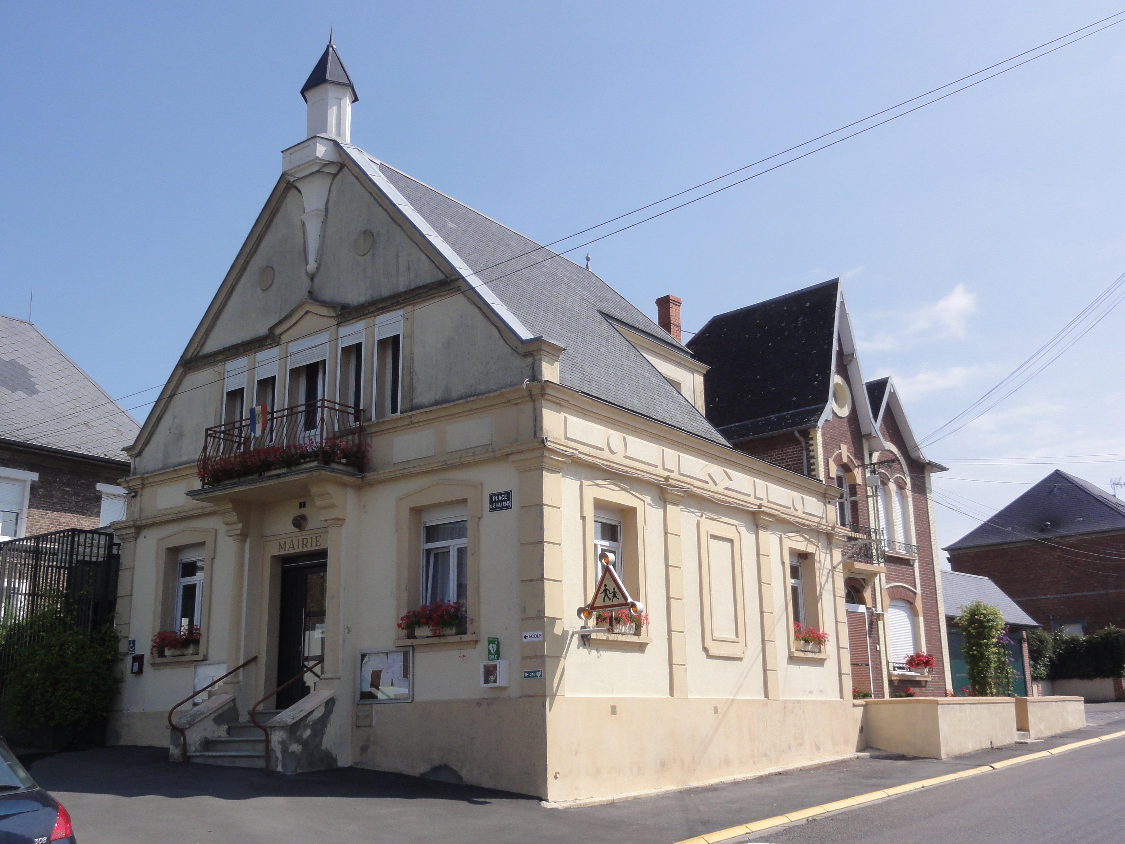 Nauroy (Aisne) mairie